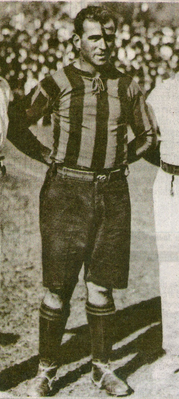 Florencio Sarasíbar en 1928